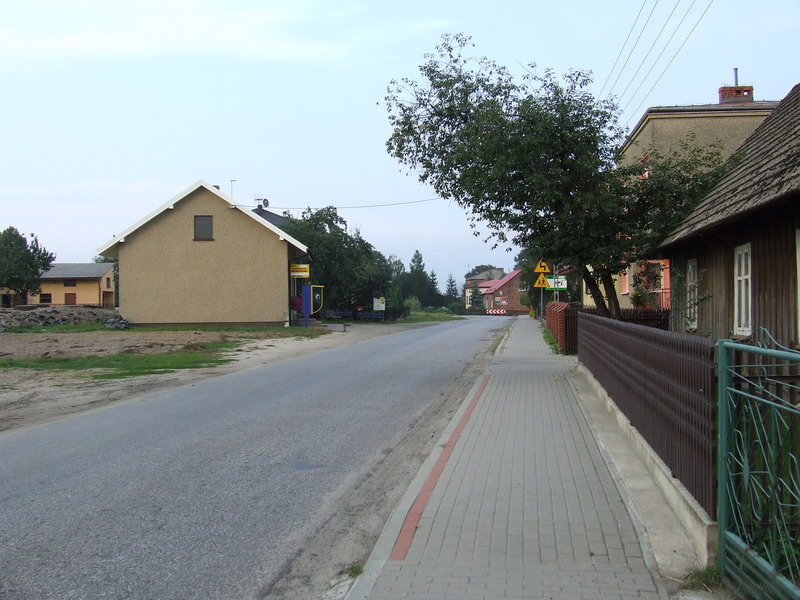 Wieś Gana - główna ulica.